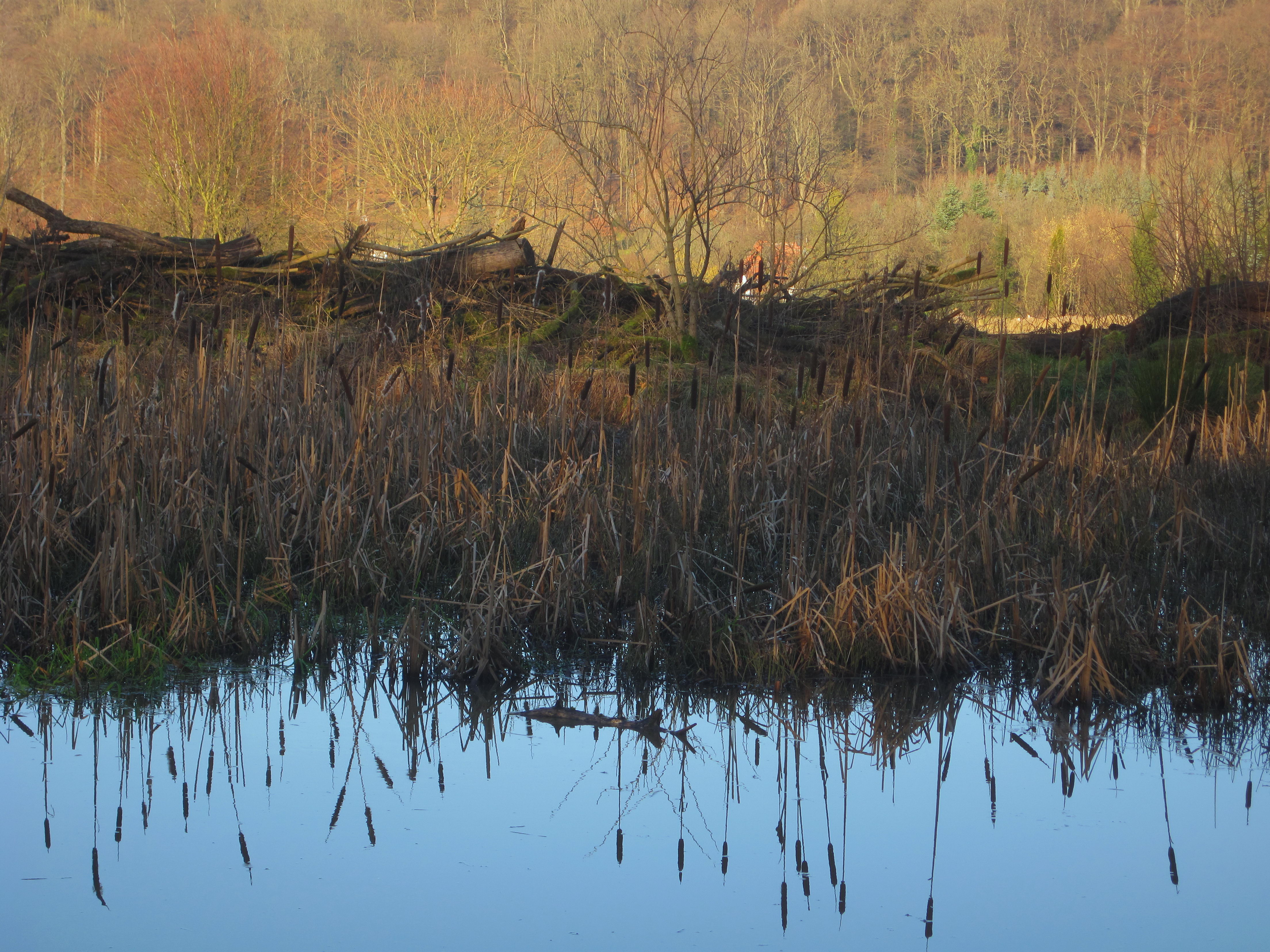 Stehendes Kleingewässer mit umgebendem Feuchtgrünland im Naturschutzgebiet Duloh-Löbbecken-Kopf in Iserlohn.